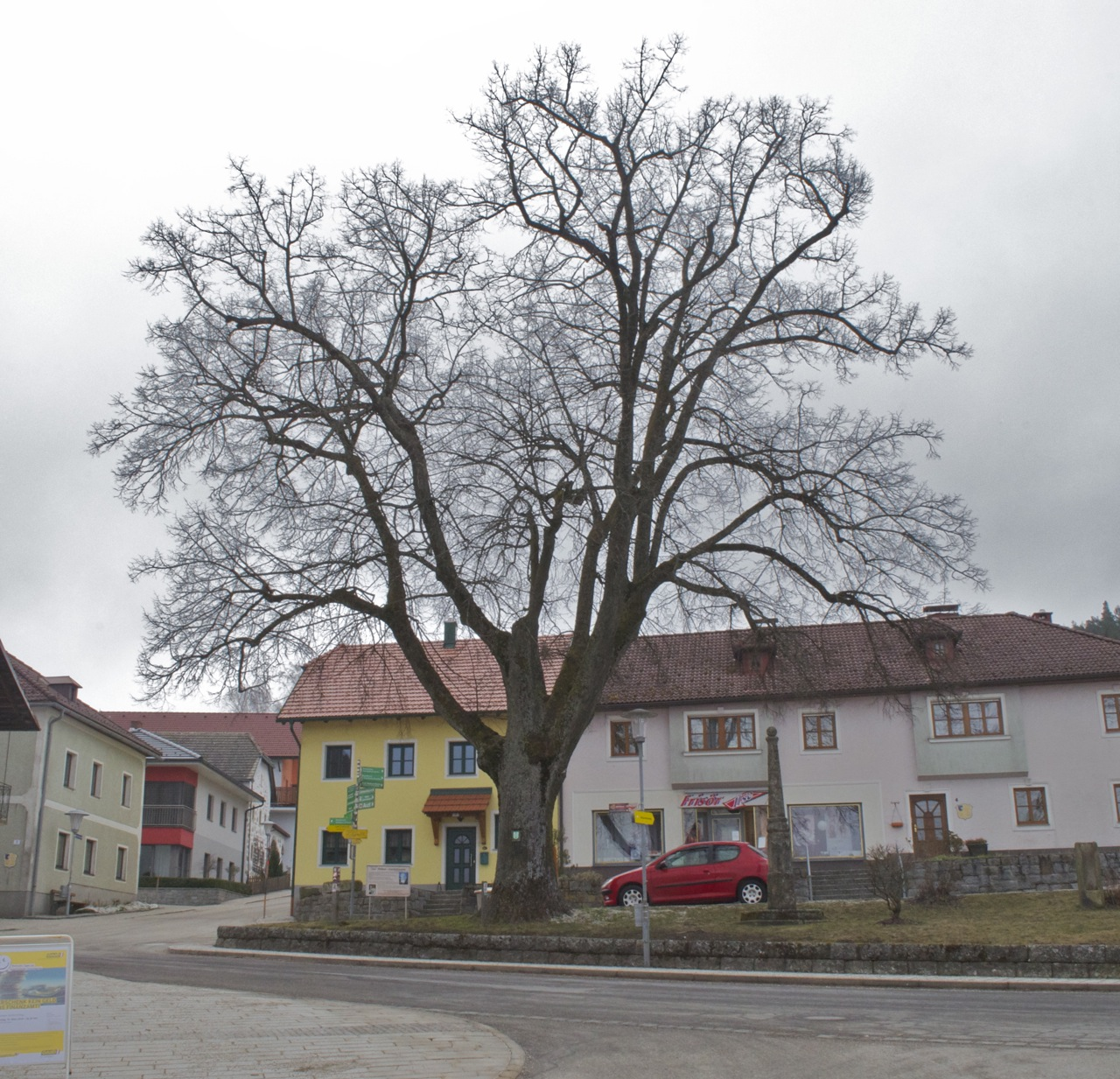 Winter-Linde "Dorflinde" in St. Leonhard bei Freistadt This media shows the natural monument in Upper Austria with the ID nd314.